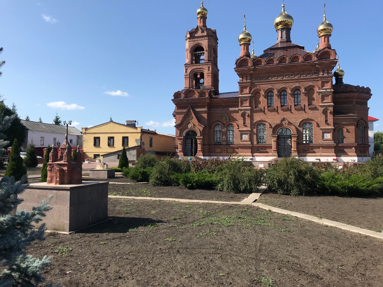 Современный вид храма (2019)